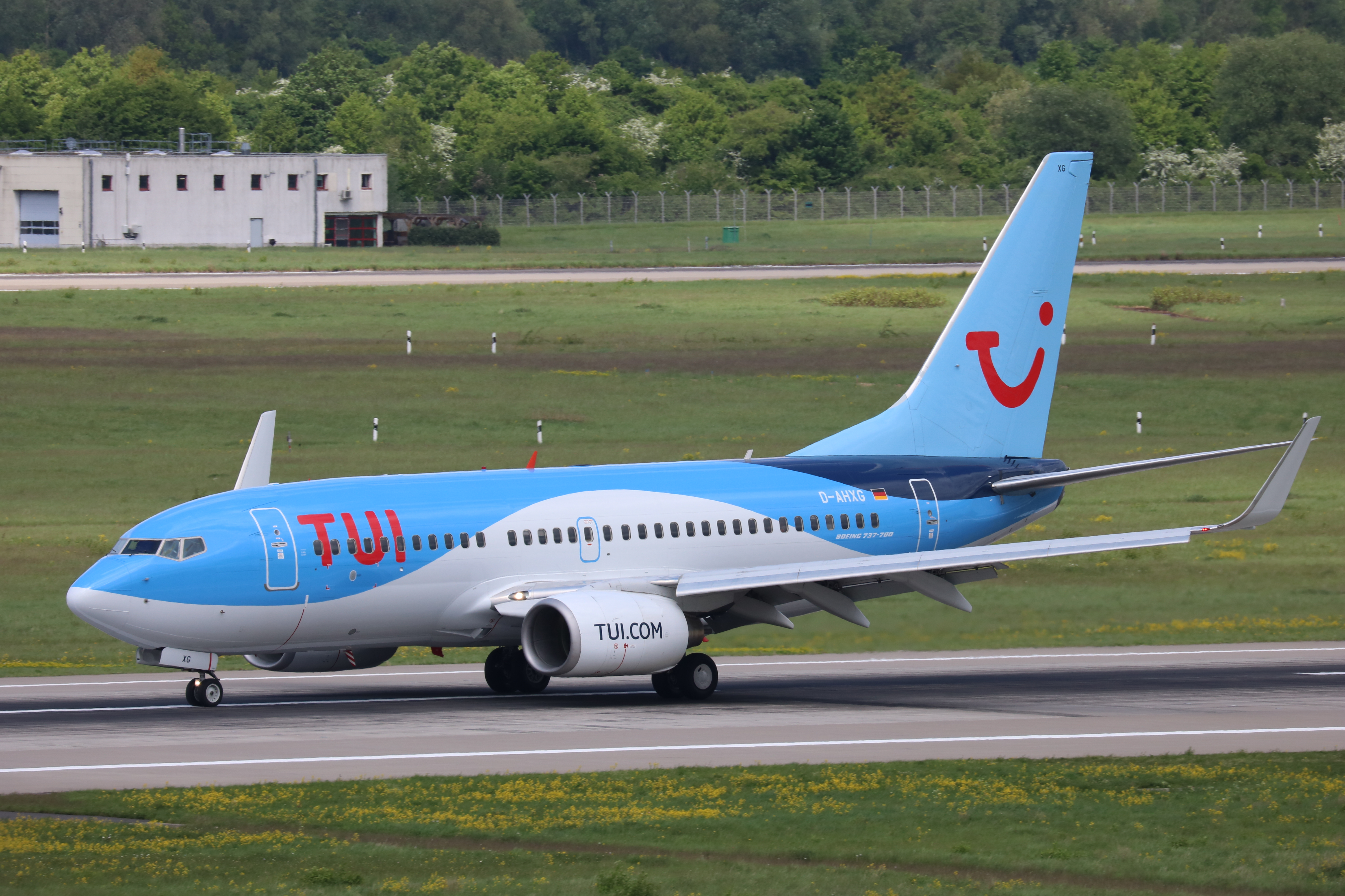 Flughafen Düsseldorf, Boeing 737-700 (D-AHXG) der TUIfly Deutschland